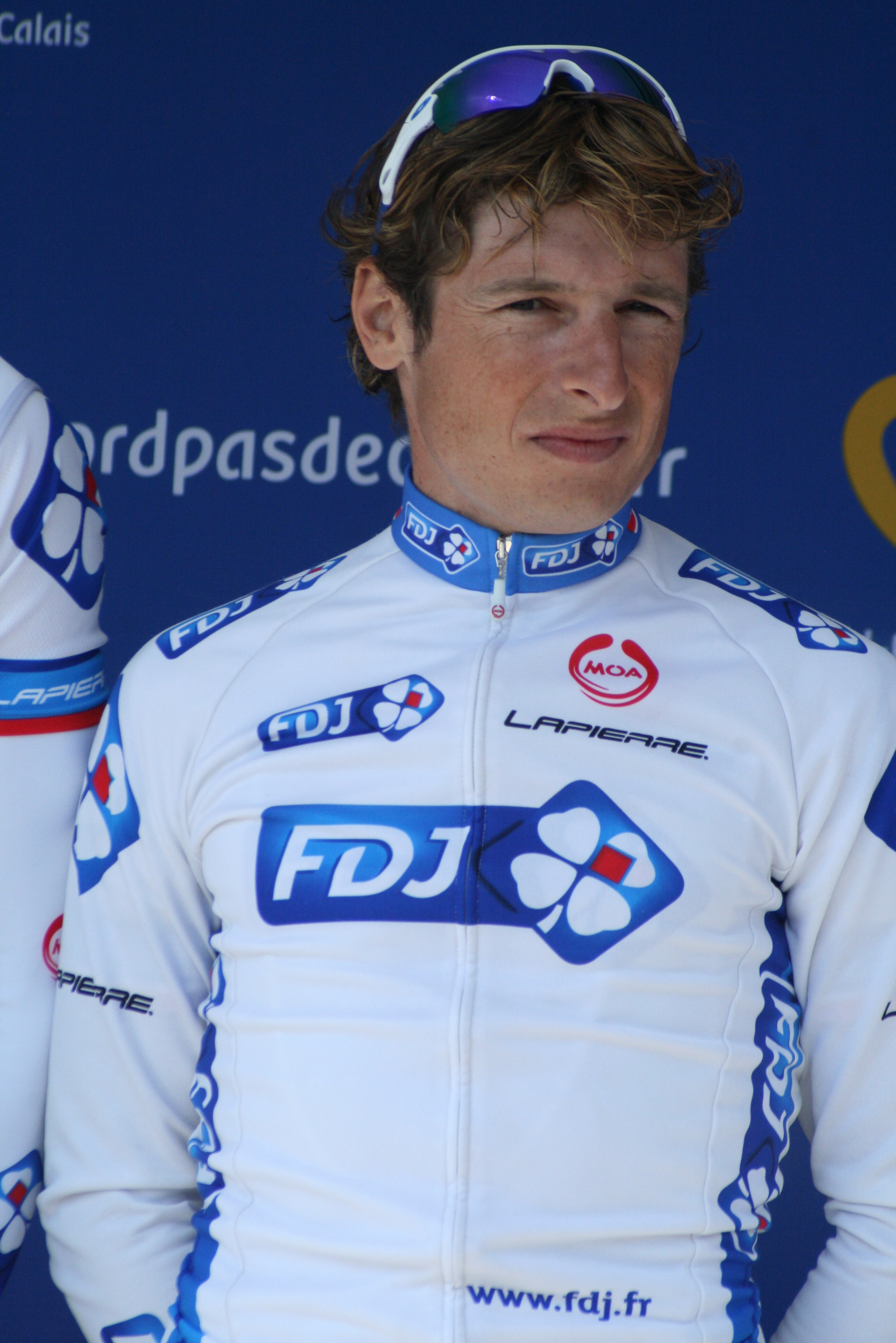 Présentation des coureurs au départ de la première étape Pierrick Fédrigo